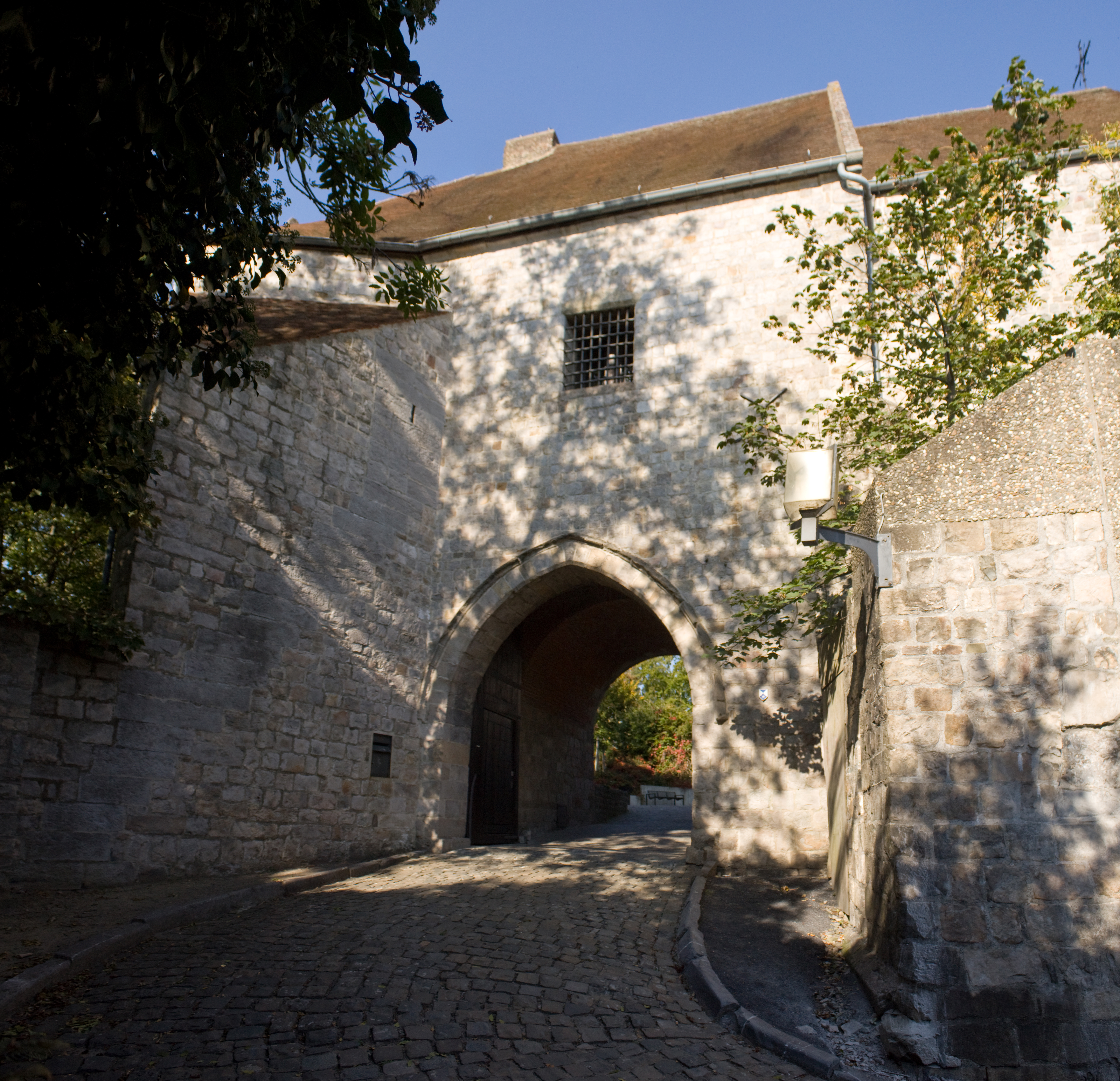 Zicht op de conciërgerie van het grafelijk kasteel in Bergen